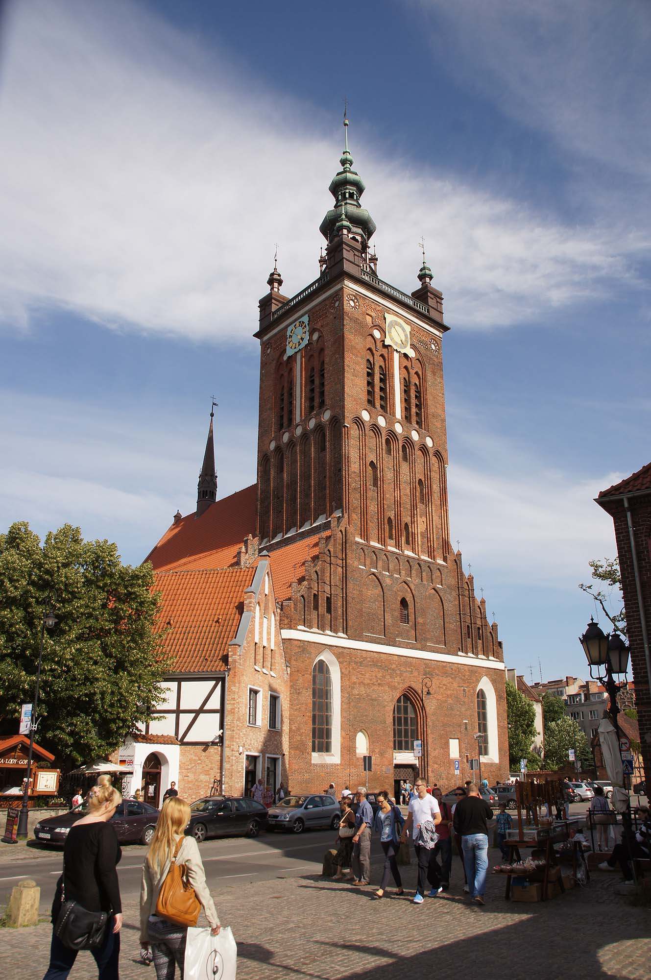 Gdańsk, kościół par., ob. rektorski p.w. św. Katarzyny, 1230, 1336-80, 1945